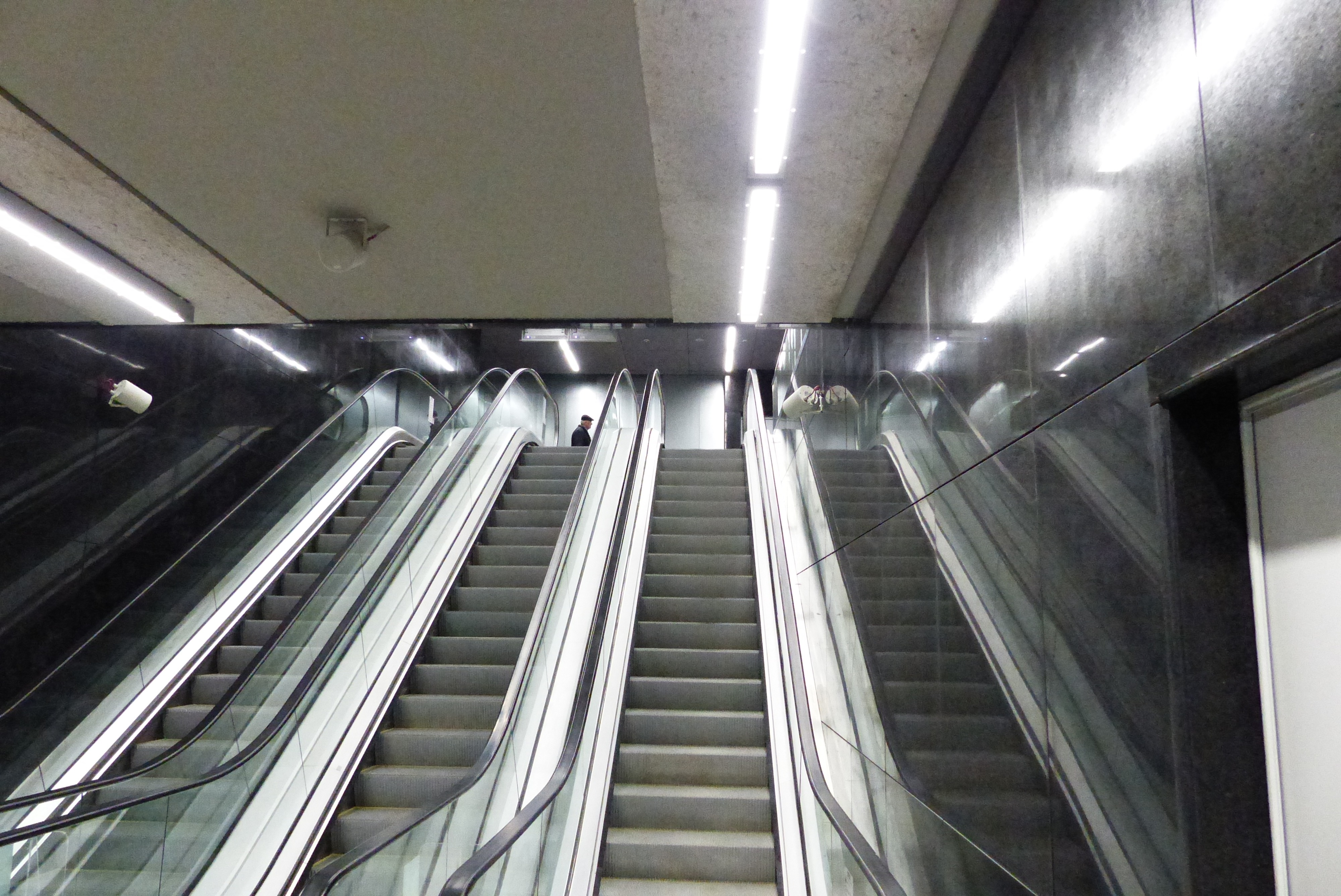 Schody łączące poziom I linii (A14) i II linii (C11) stacji Świętokrzyska